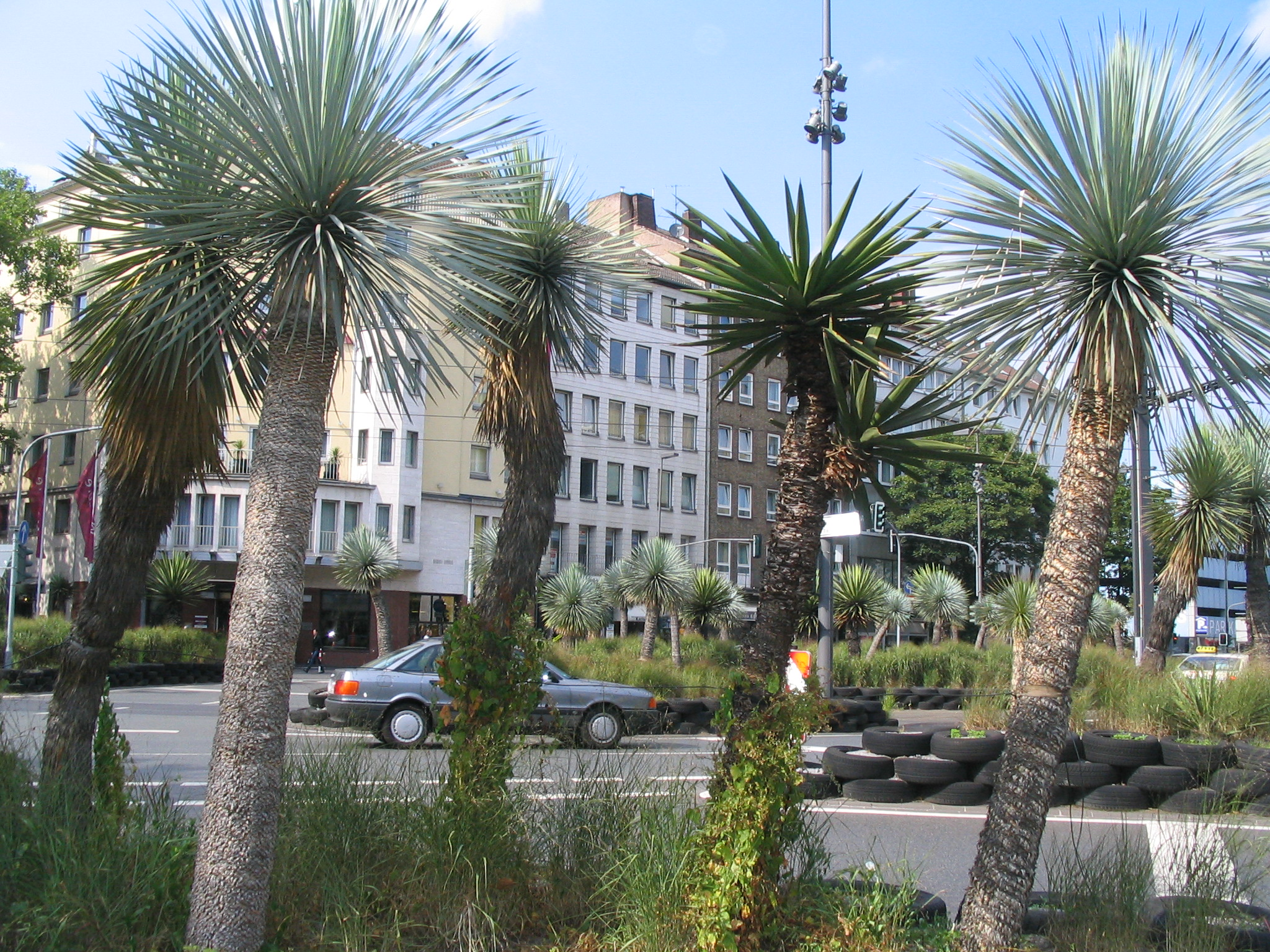 Düsseldorf, Stresemannplatz in Richtung Karlstraße. Pflanzung von Tita Giese.